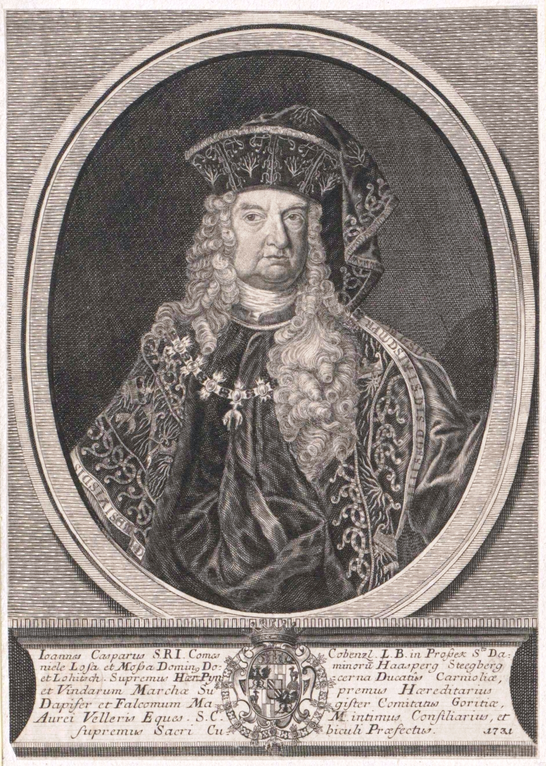 Johann Caspar II. Graf von Cobenzl (1664–1742)